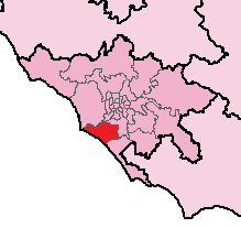 Collegio uninominale di con la legge Mattarella per la Camera dei Deputati.